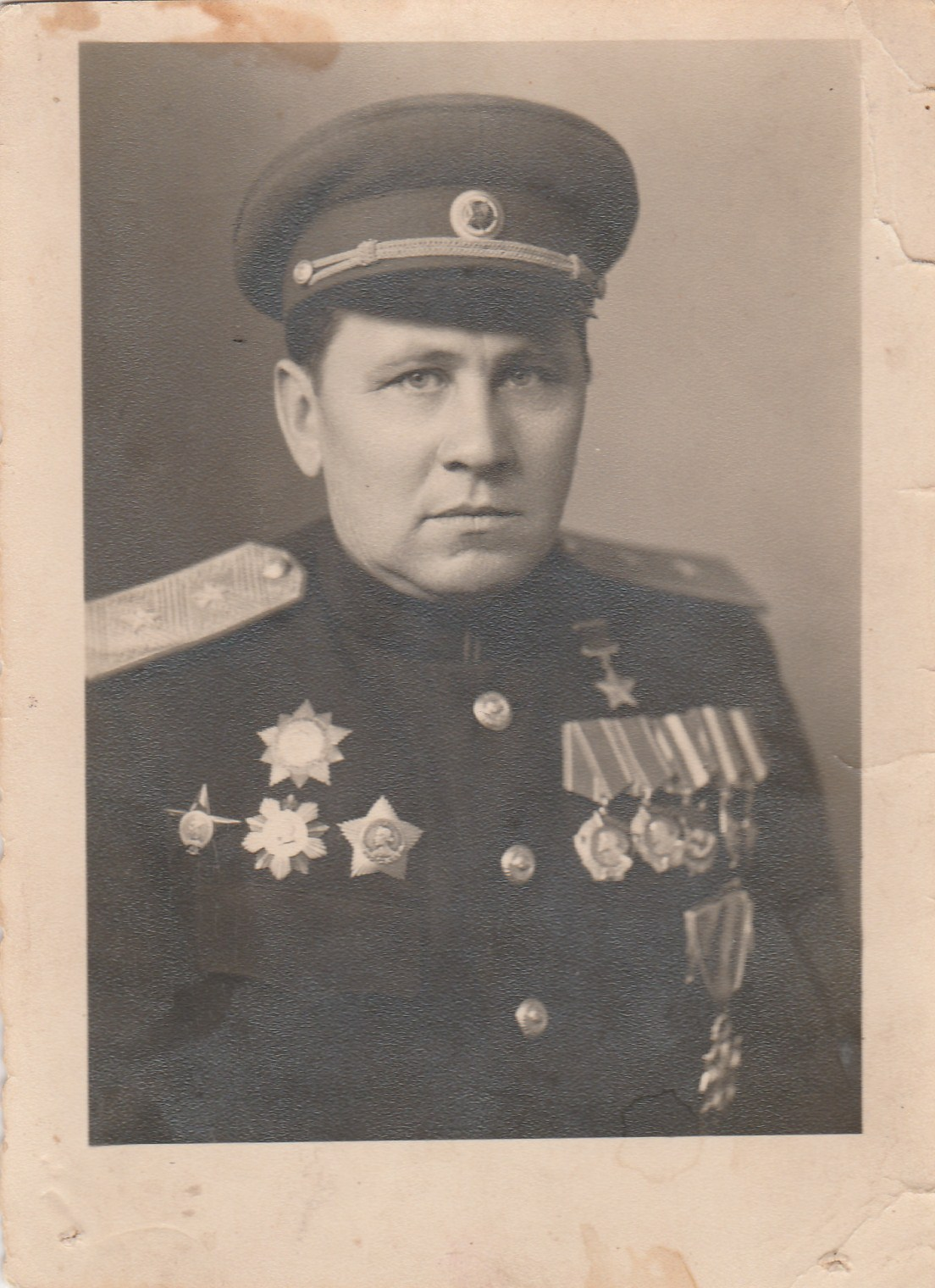 Участник Великой Отечественной Войны. Герой Советского Союза Смирнов Дмитрий Иванович. 18 июня 1945 год. Берлин.